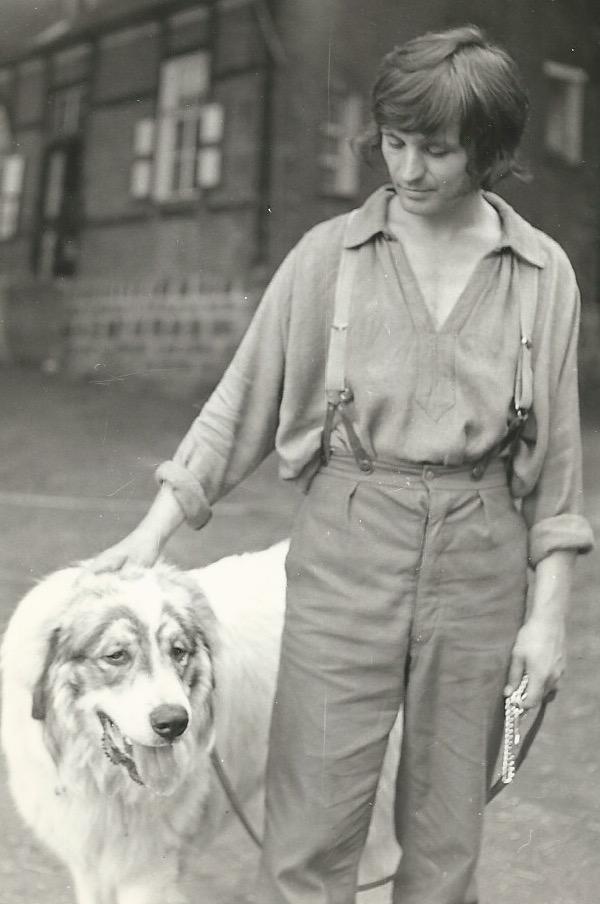 Opnames film Pallieter (rond 1976)